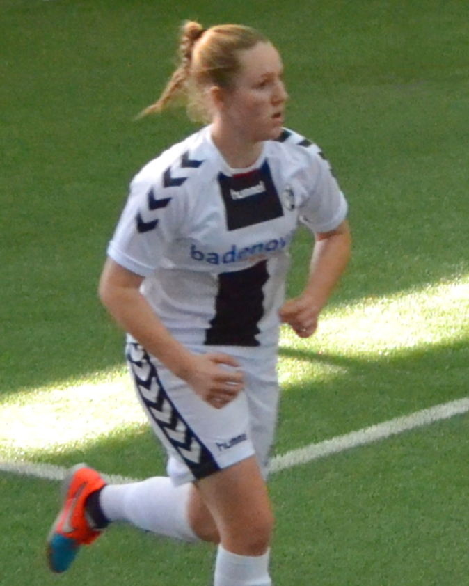 Vanessa Ziegler (SC Freiburg) beim SAP Frauen-FußballCup 2017